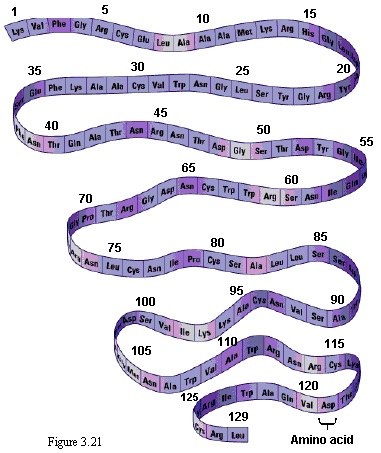 Struktura_Primare